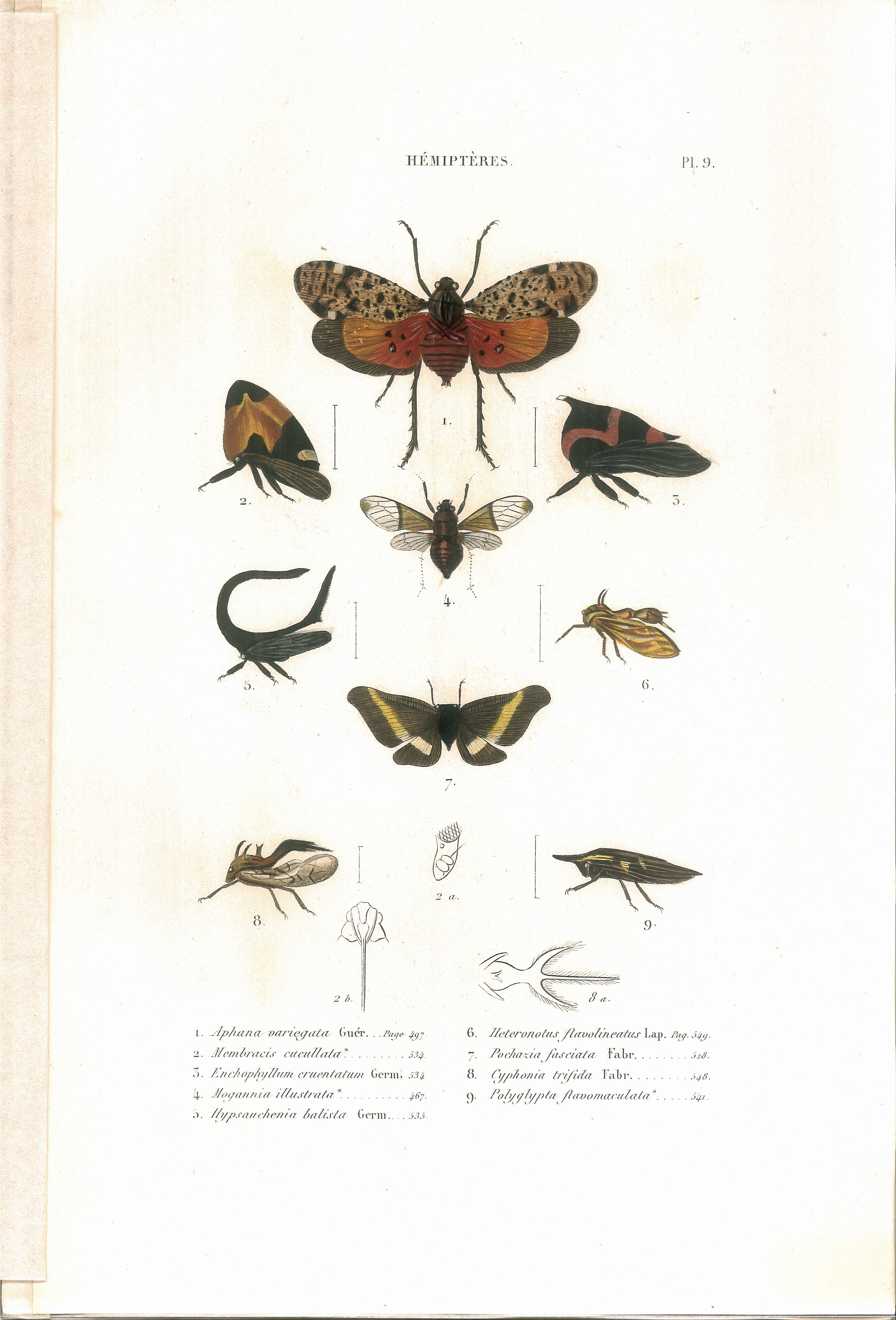 Amyot, C. J.-B. et J. G. Audinet-Serville (1843). Histoire naturelle des insectes. Hémiptères. Paris, Librairie encyclopédique de Roret. Planche IX. Pour compléter l'ouvrage disponible par ailleurs en pdf mais avec les planches en noir et blanc : (PDF)